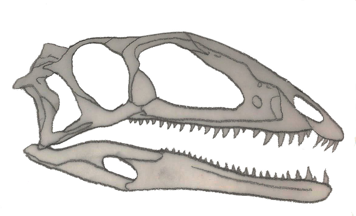 restoration of Zupaysaurus skull